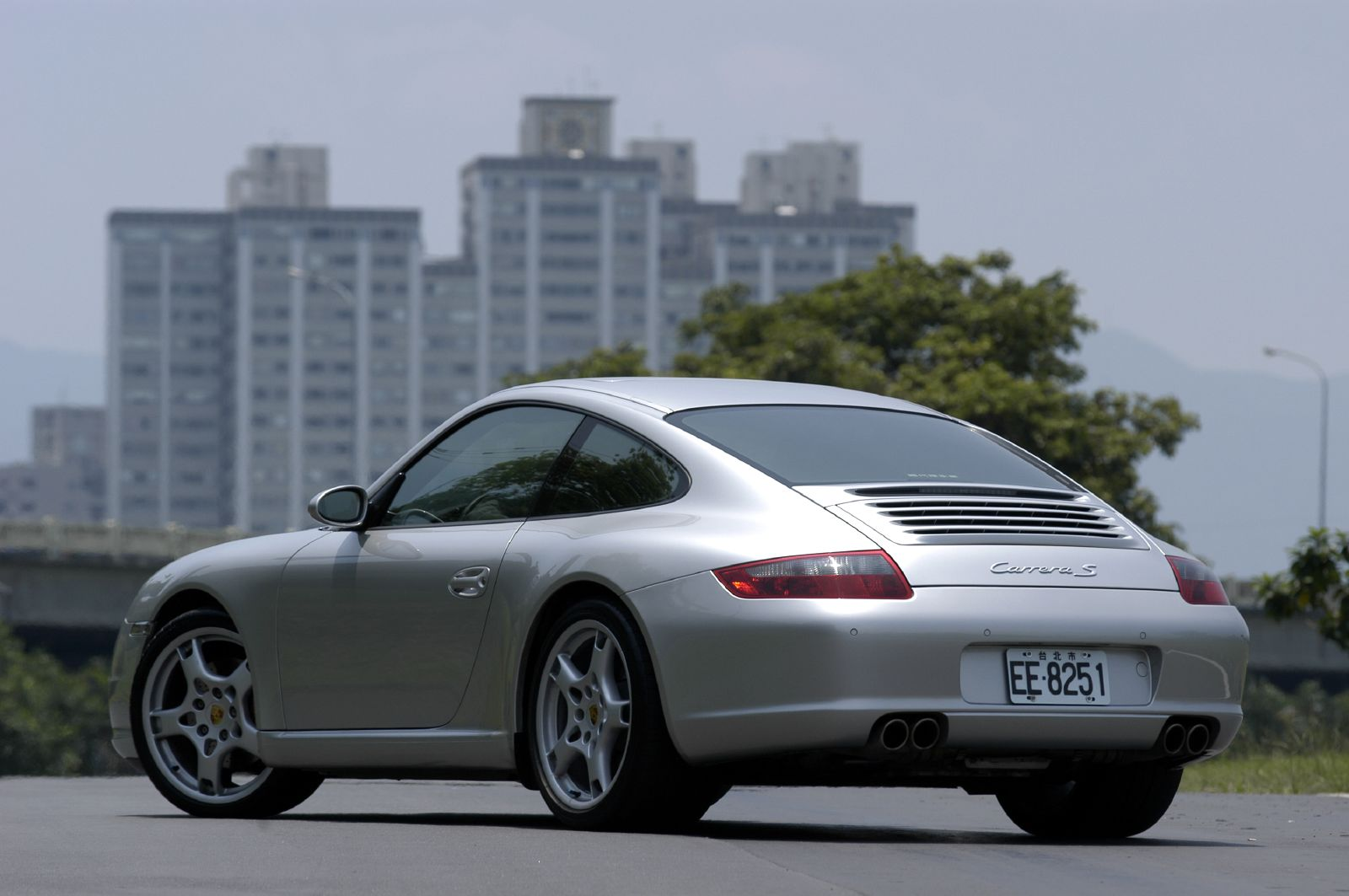 2005 Porsche 997 Carrera S 2005 Porsche 997 Carrera S.jpg997